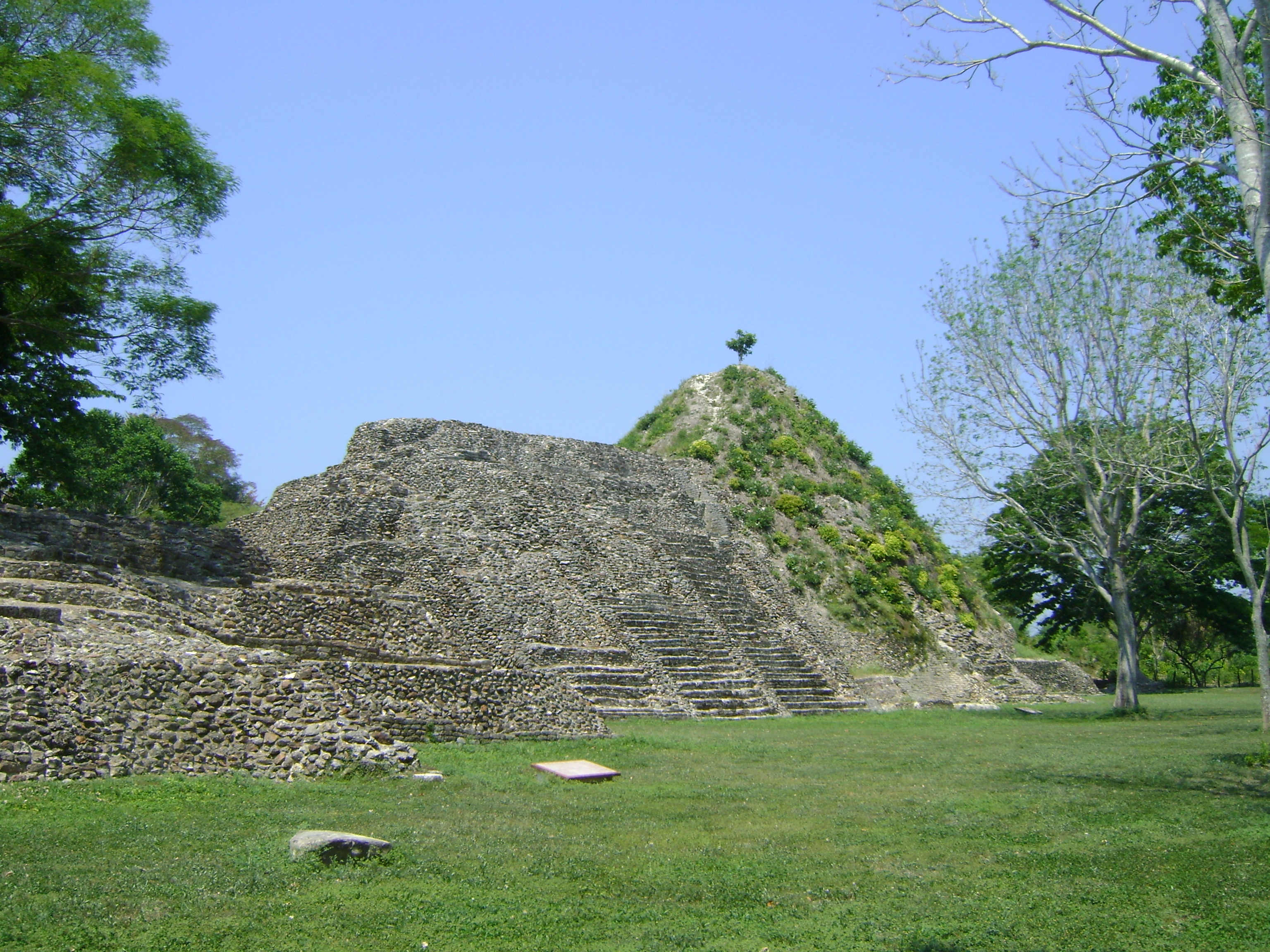 Restauración por etapas y respetando el entorno paisajístico en la ZA Reforma.